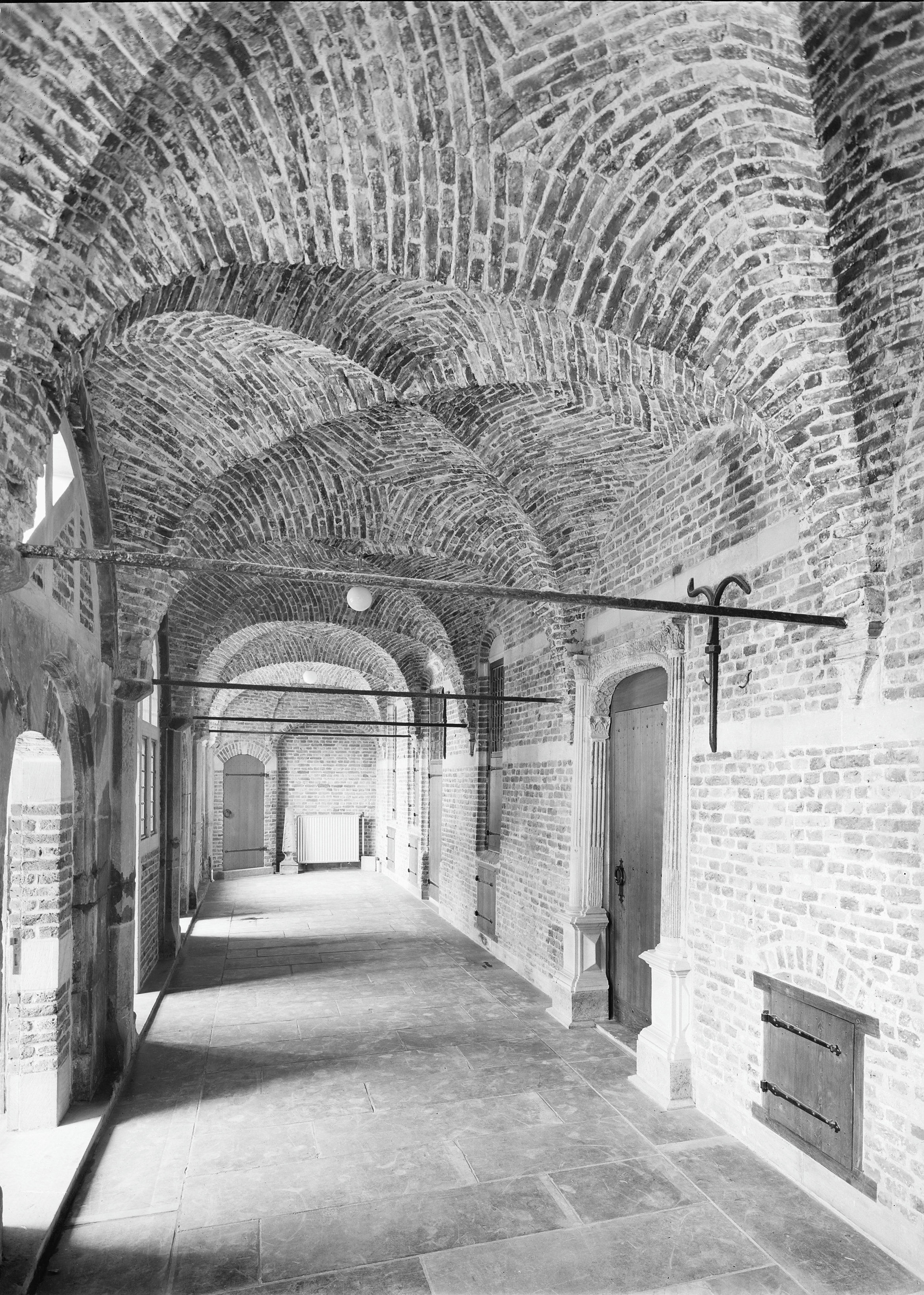 Raadhuis: oud raadhuisfront, interieur gelijkstraats